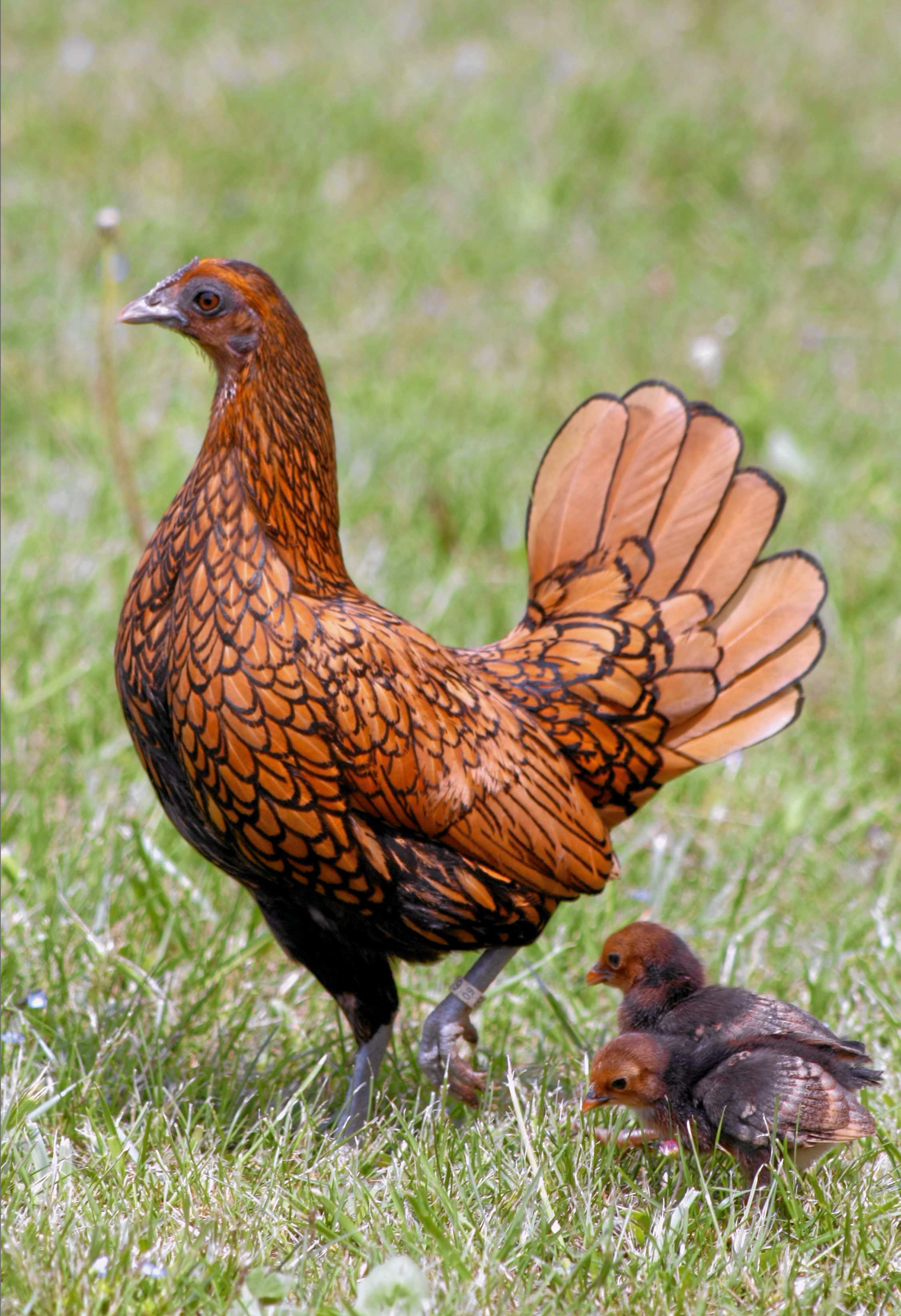 Poule Sebright Dorée